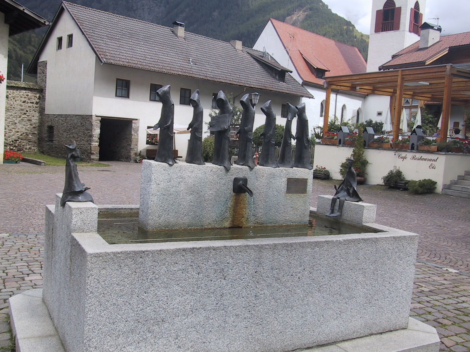 Der Brunnen von Martin Rainer auf dem Hauptplatz von Karthaus im Schnalstal (Vinschgau)